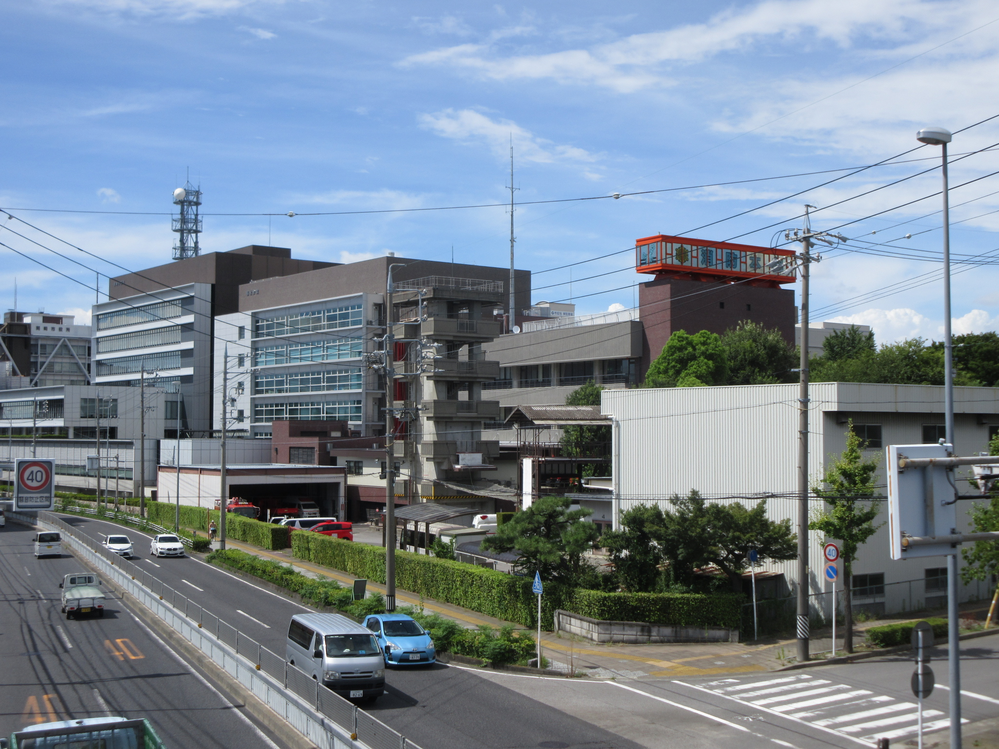 岡崎市消防本部中消防署（右）。岡崎市役所の福祉会館と東庁舎。